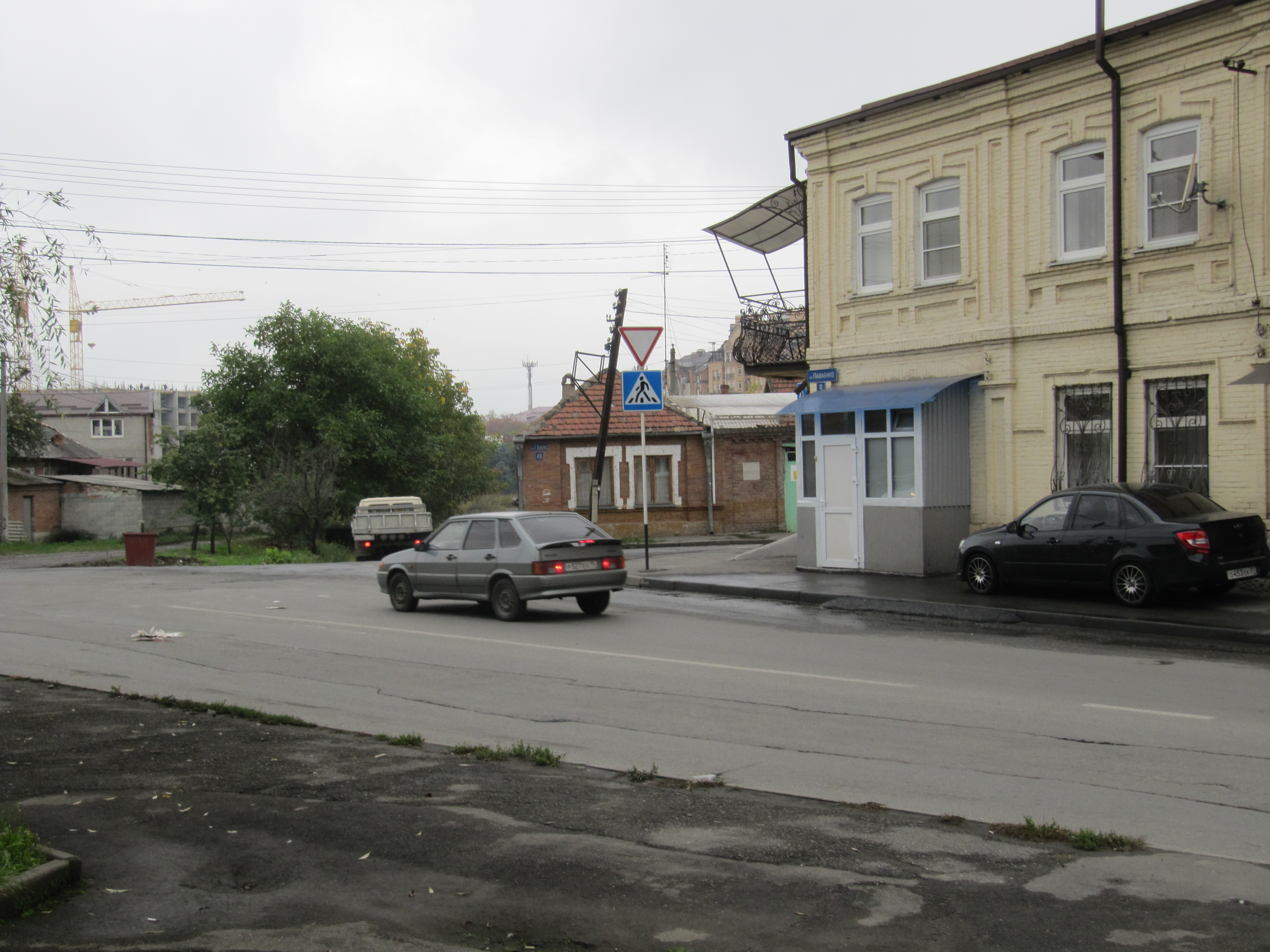 Перекрёсток улиц Павленко и Гаппо Баева, Владикавказ